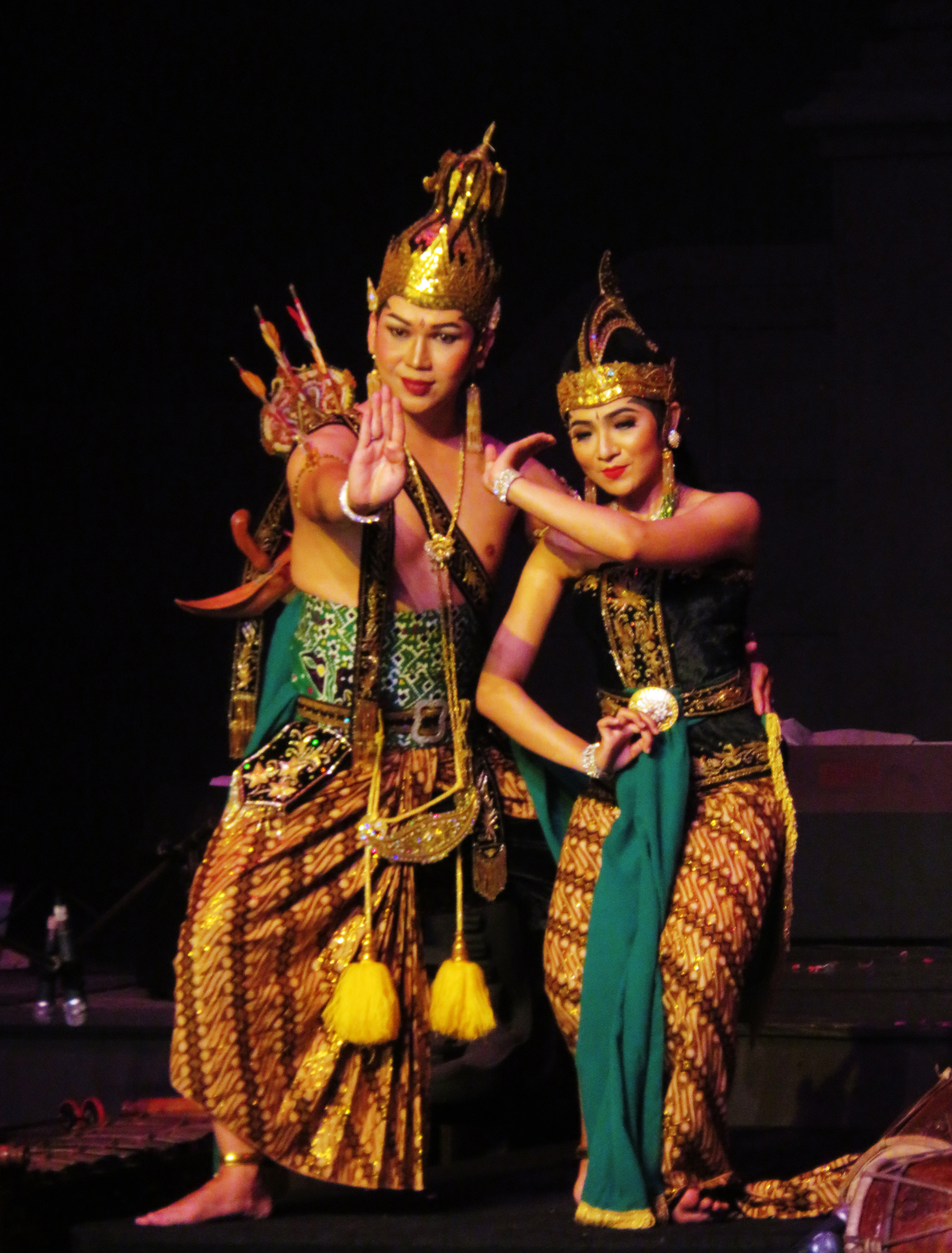 Dua tokoh utama dalam sendratari Ramayana. Yang kiri adalah Ramawijaya dan yang kanan adalah istrinya; Shinta.